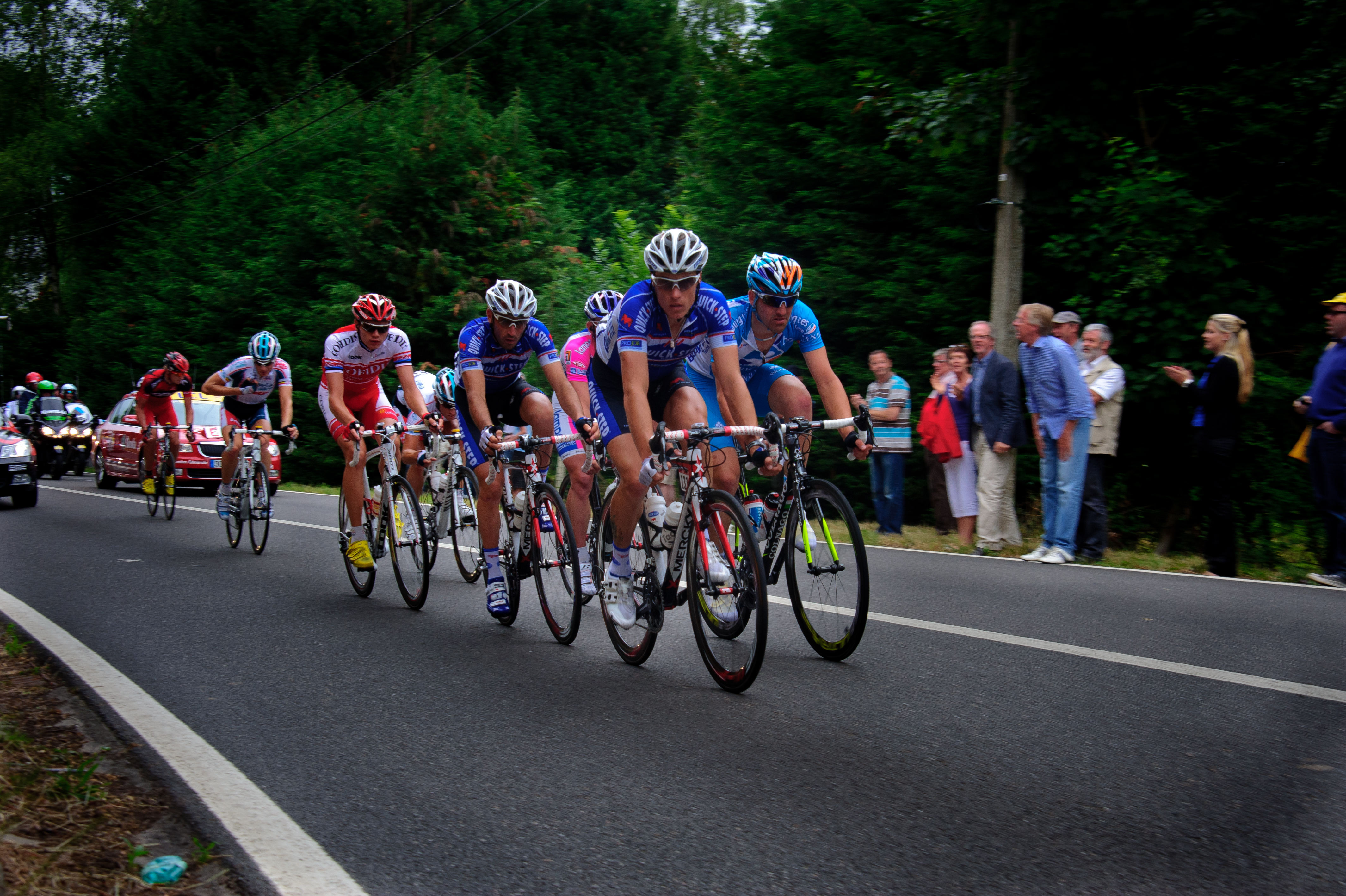 Groupe de 8 coureurs échappés lors de la 2eme étape du Tour de France 2010 entre Bruxelles et Spa.